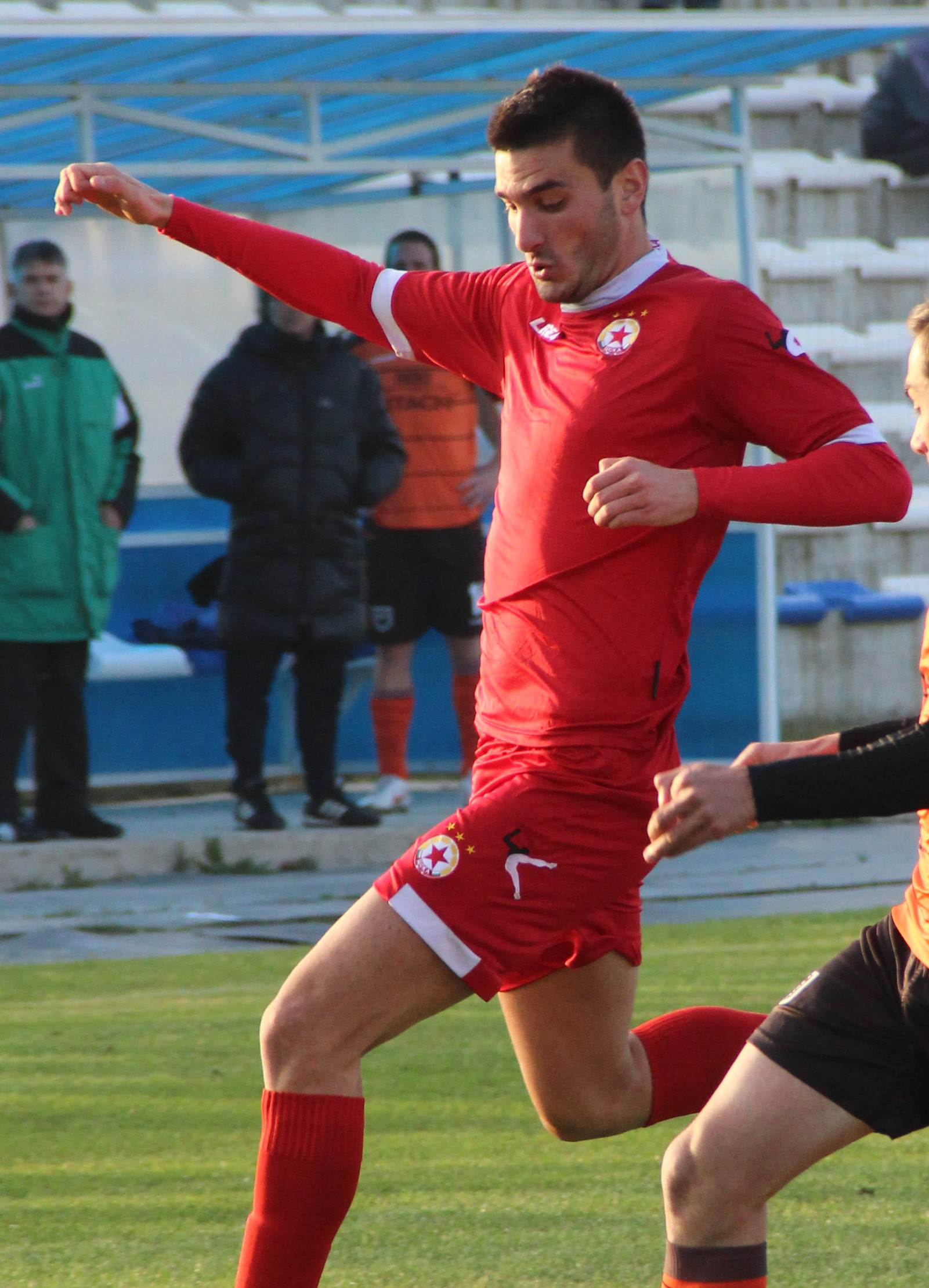 Християн Кировски (на македонски: Христијан Кировски) (роден на ) е македонски футболист, нападател, състезател на ПФК ЦСКА (София).